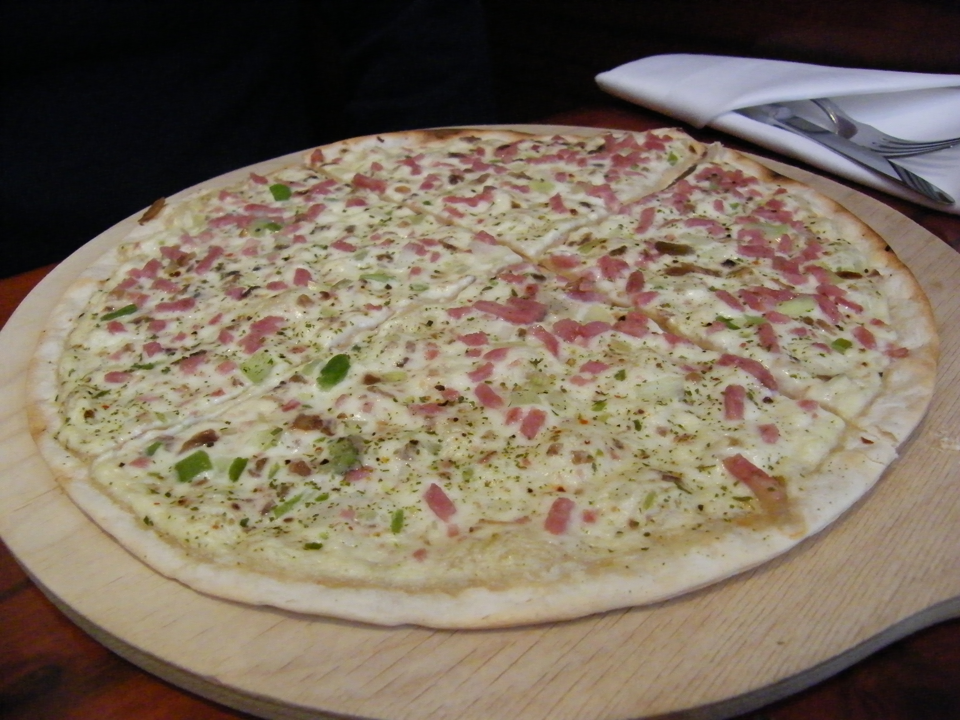 Ein Flammkuchen, der im bayerischen Bad Griesbach serviert wurde.